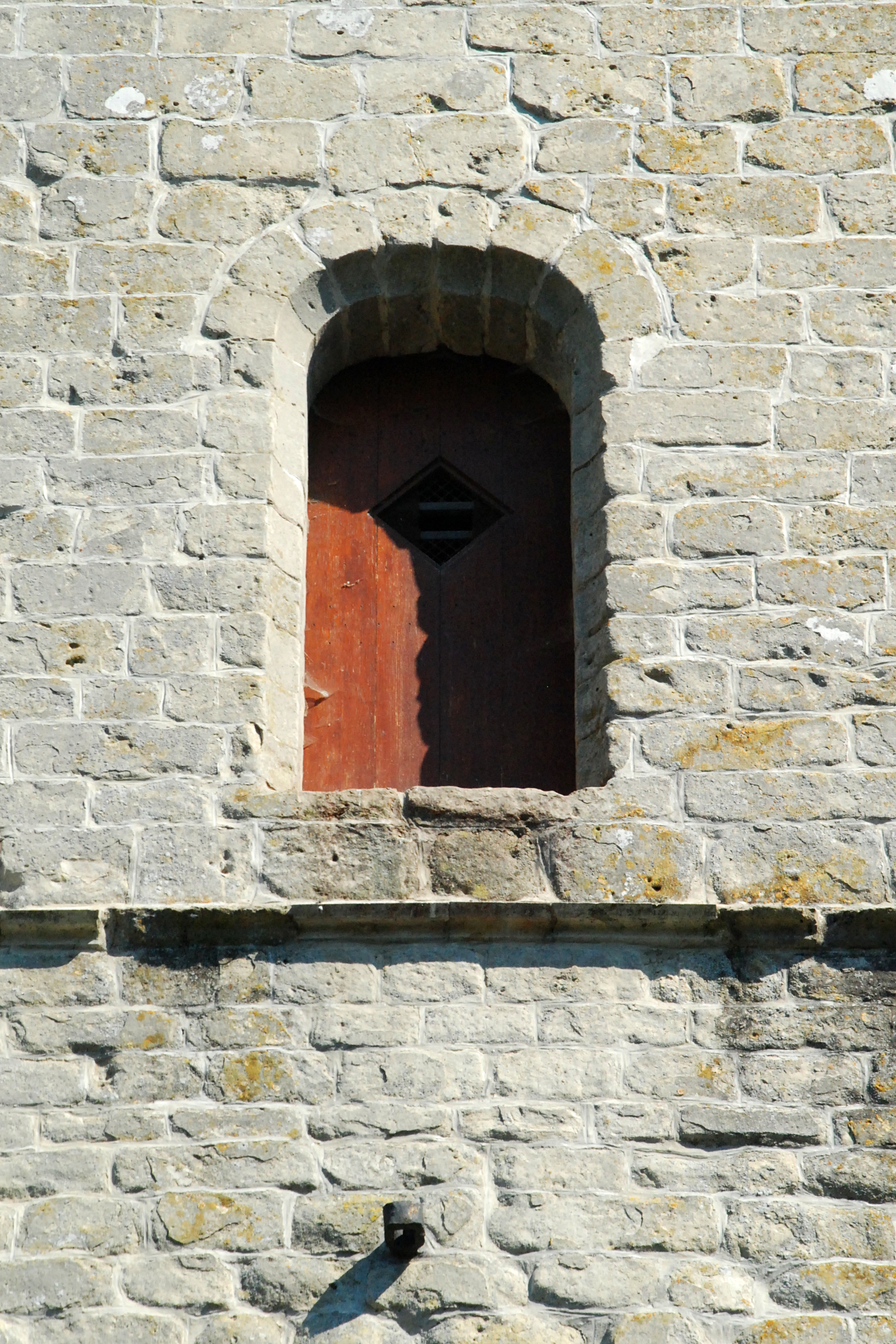 Belgique - Brabant Wallon - Lasne - Église Saint-Étienne d'Ohain